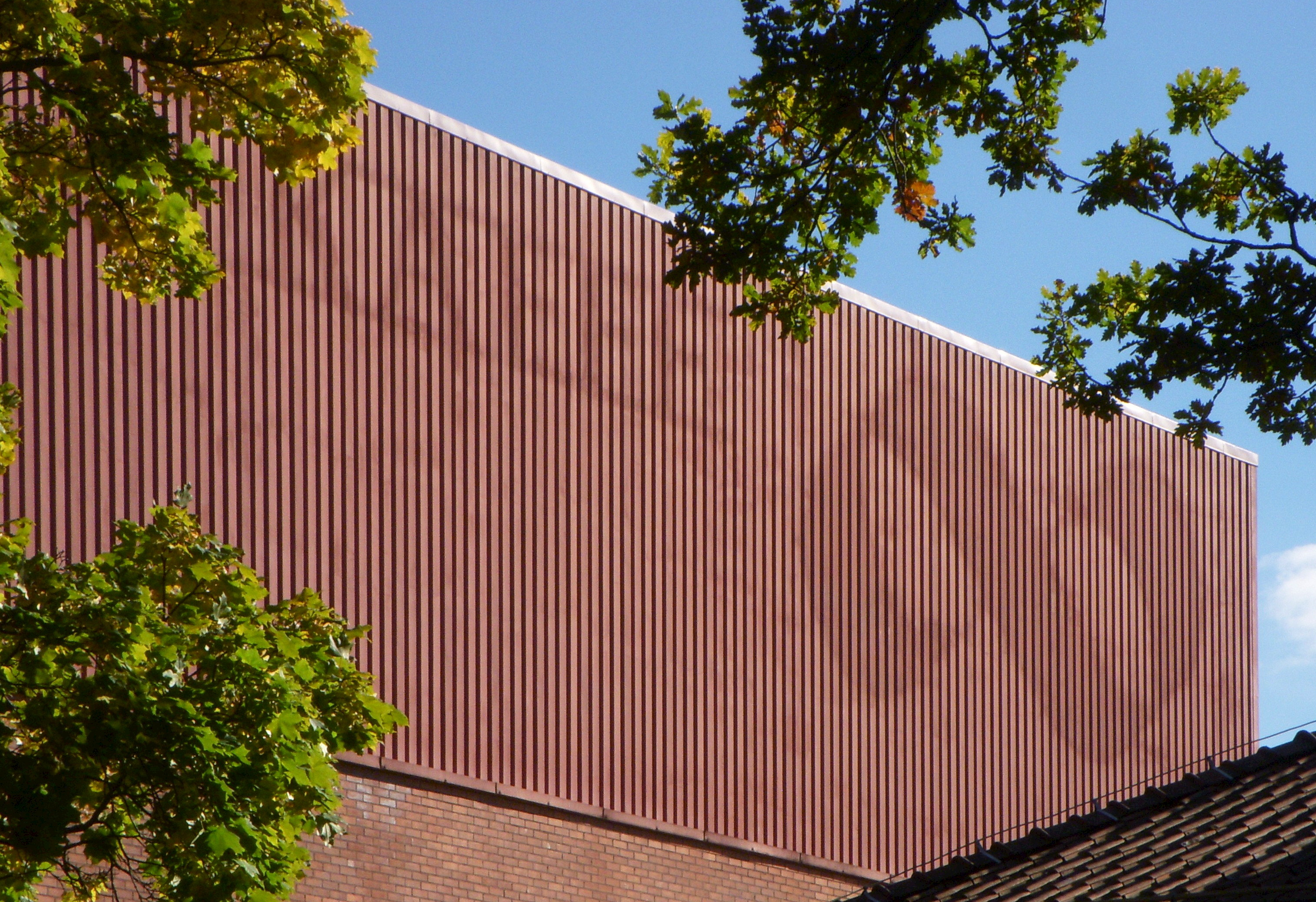 KF:s kafferosteri i Gäddviken